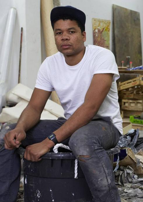 Oscar Murillo en su estudio